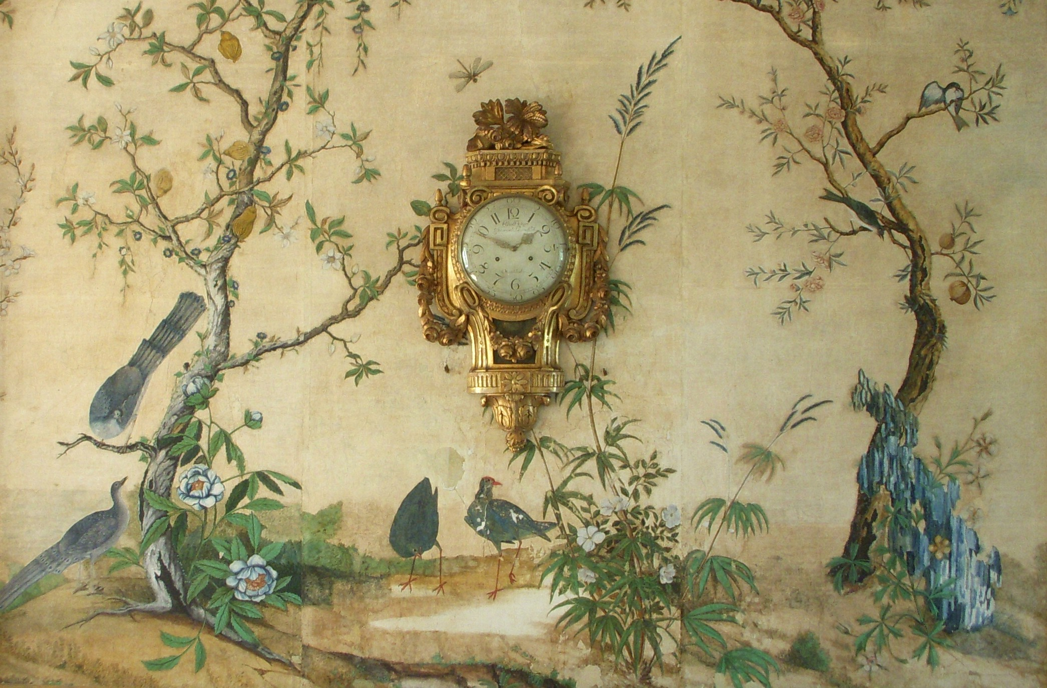 Rokoko-gården Svindersvik i Nacka, rispapperstapet i salongen, detalj